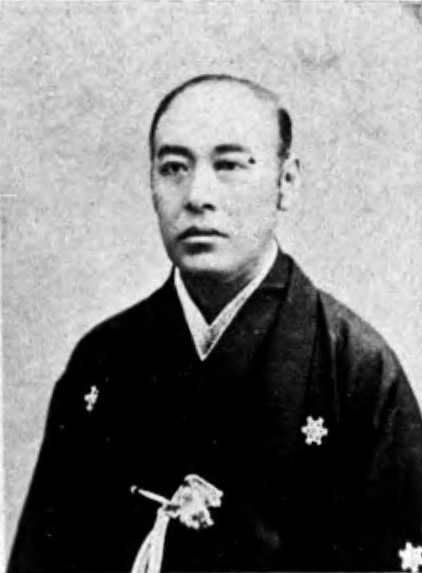 滝兵右衛門(1843～1918)